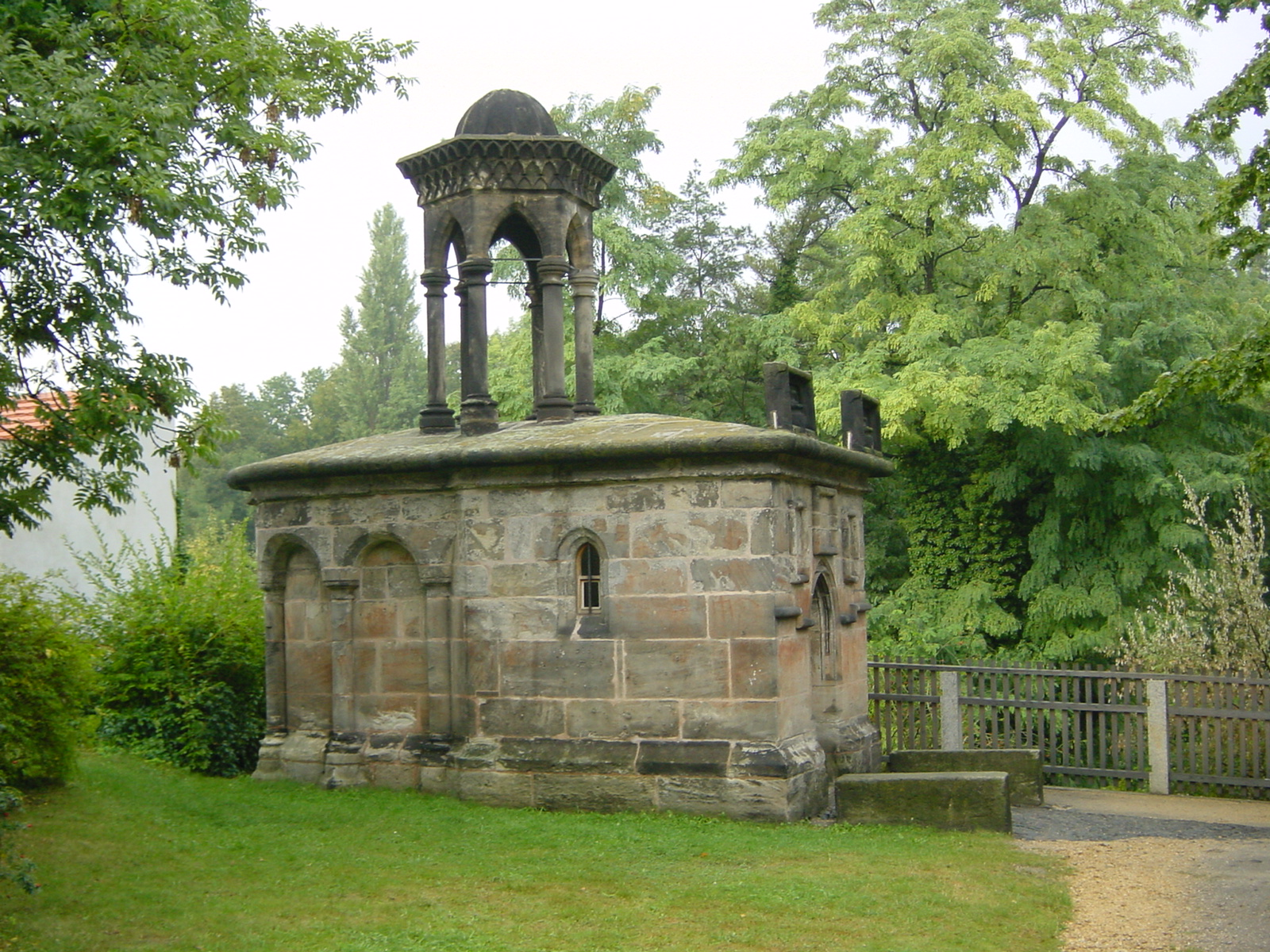 Grabeskapelle, Heiliges Grab, Görlitz